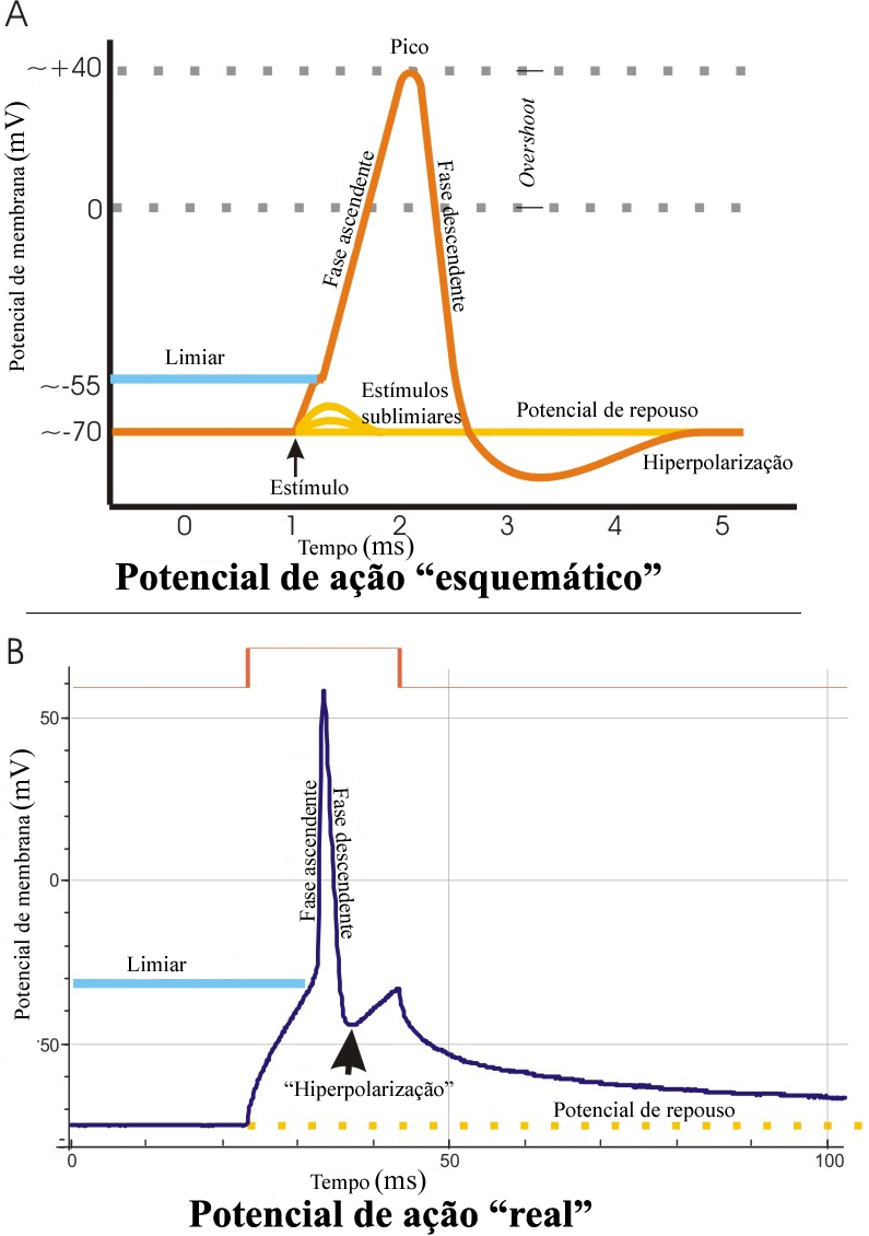 Adaptado de (autor)